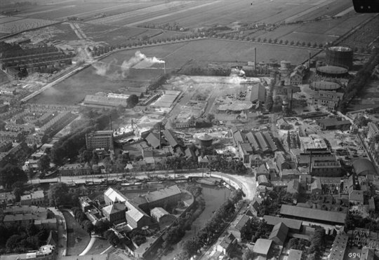 De Gemeentelijke Gasfabriek in Utrecht aan de Wittevrouwensingel. Rechtsbovenin de luchtfoto de gashouders die uiteindelijk pas rond 1970 werden afgebroken. Vandaag de dag bevindt zich op het terrein van de gasfabriek het Griftpark. Binnengrachts in de foto is het voormalige bolwerk Wolvenburg zichtbaar, waar in de foto en heden de gevangenis aan het Wolvenplein staat. Tevens zichtbaar in de foto is de voormalige veevoederfabriek Hooghiemstra.